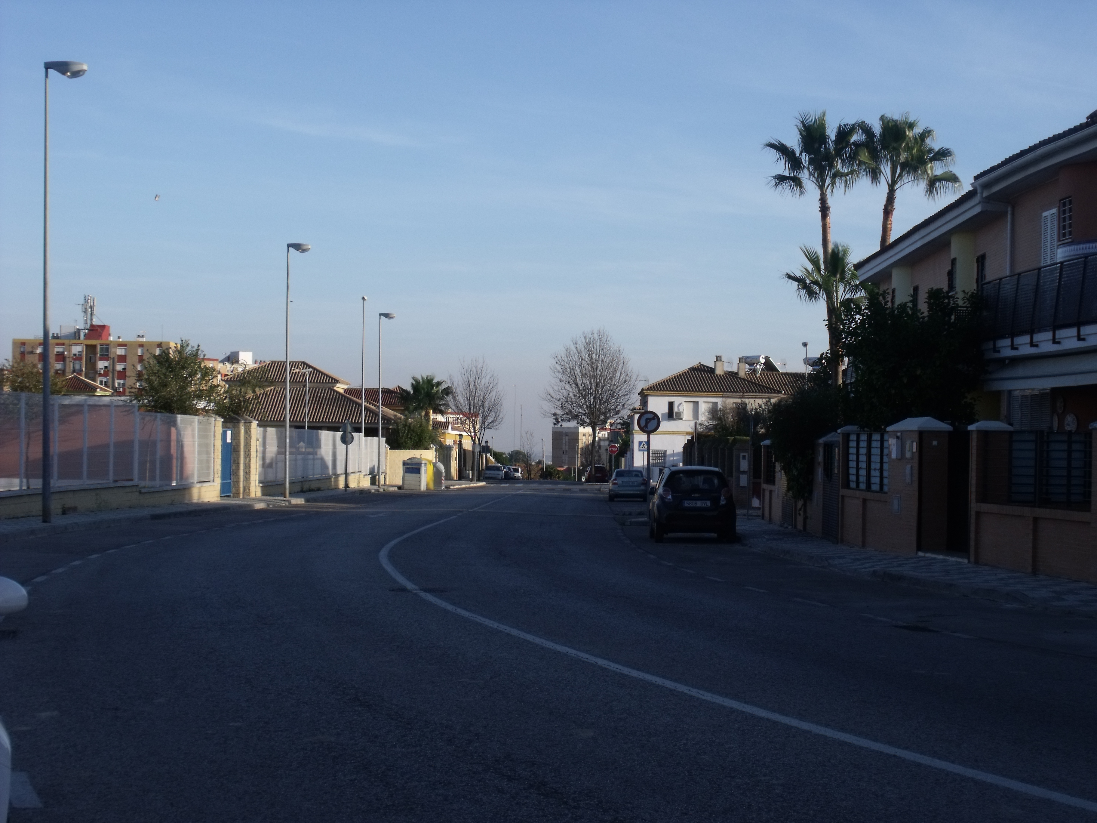 Vista general de una calle de Bormujos